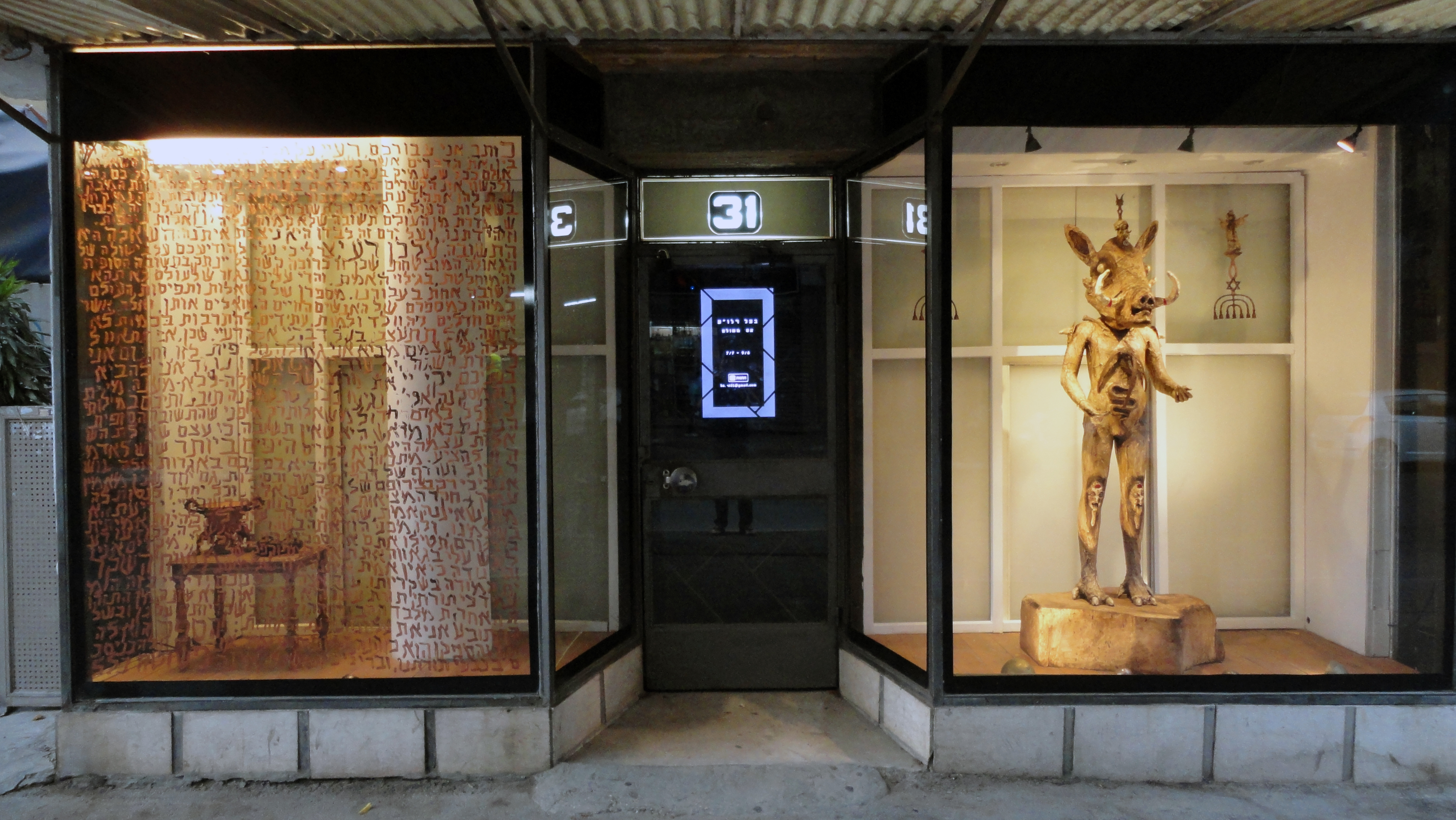 Assi Meshulam at Hahanot Gallery, 31 Haaliya st, Tel Aviv-Yaffo